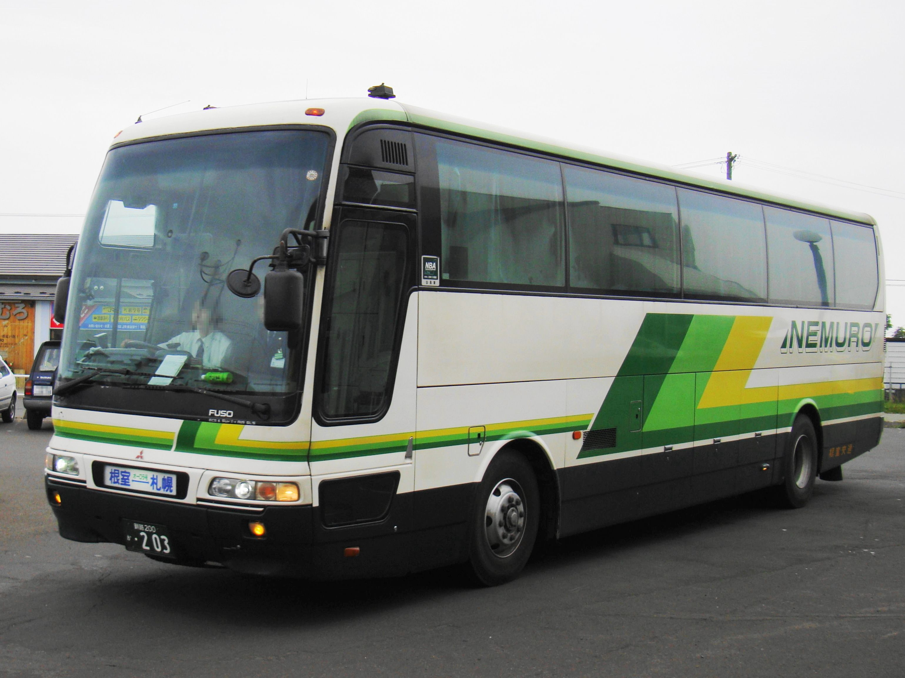 "Aurora gō" Sapporo to Nemuro